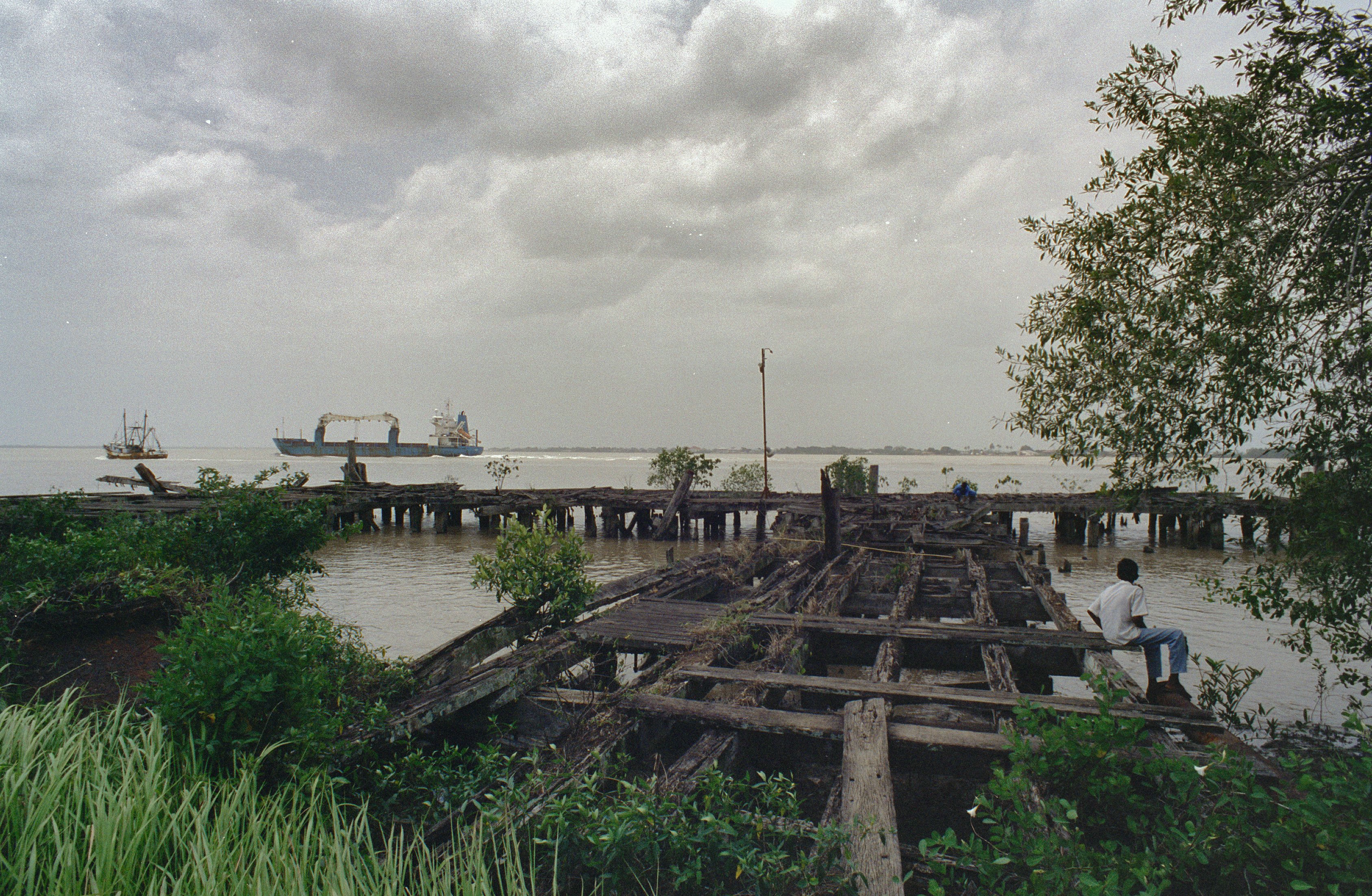 Koloniale geschiedenis: Zicht op stijger naar open water (opmerking: Suriname reis Loek Tangel)